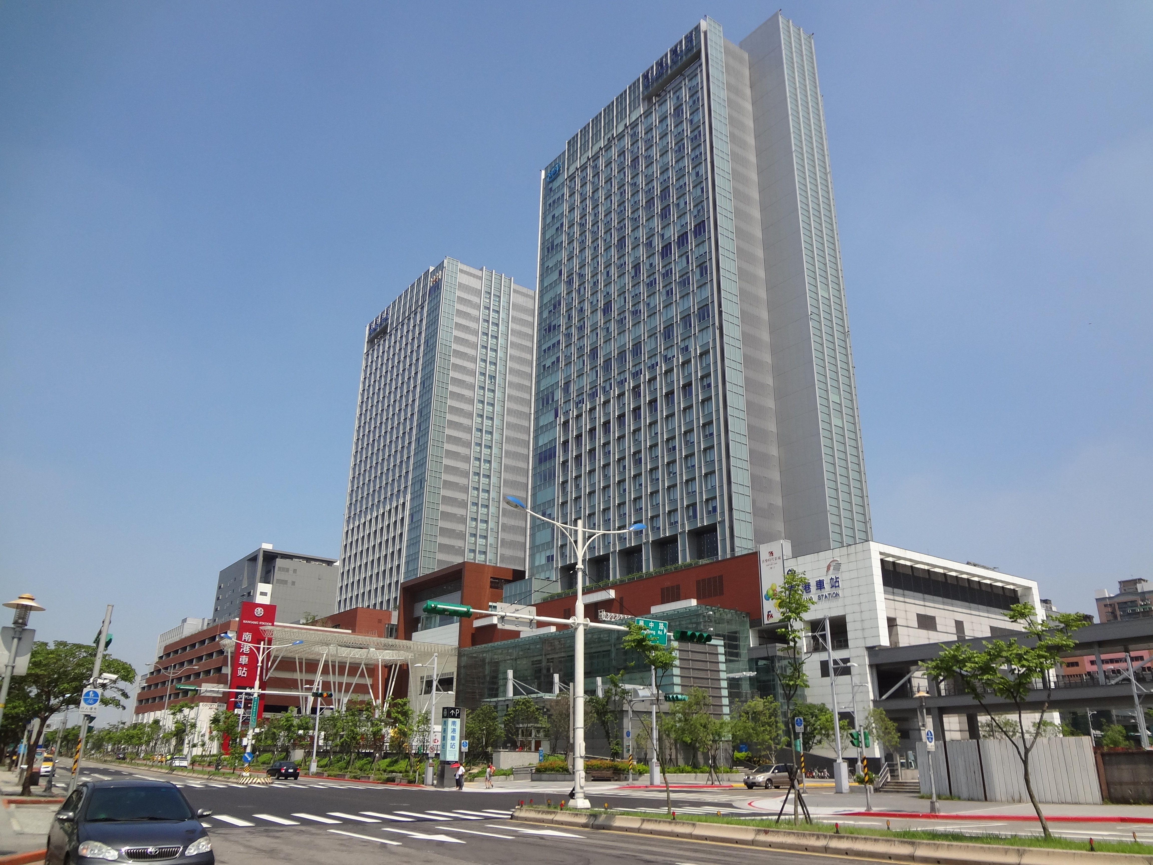 中文（台灣）: 南港車站大樓面向臺北市南港區忠孝東路七段的立面。